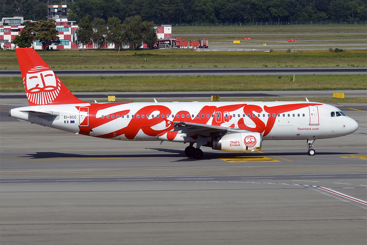 Ernest, EI-GCC, Airbus A320-233